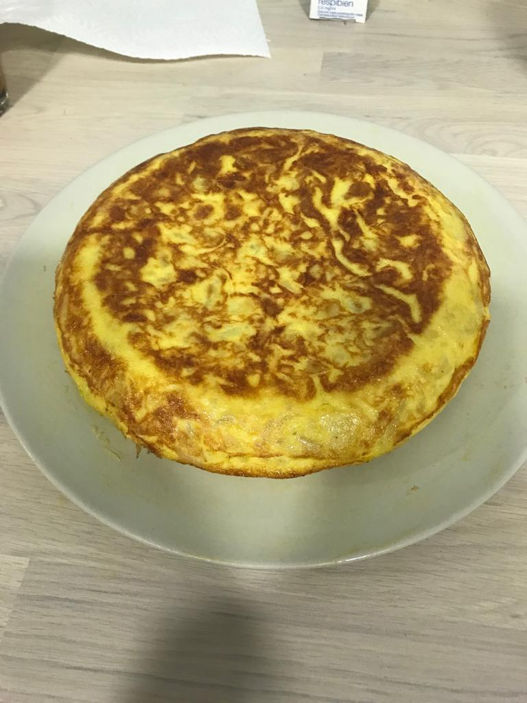 Foto con hollín